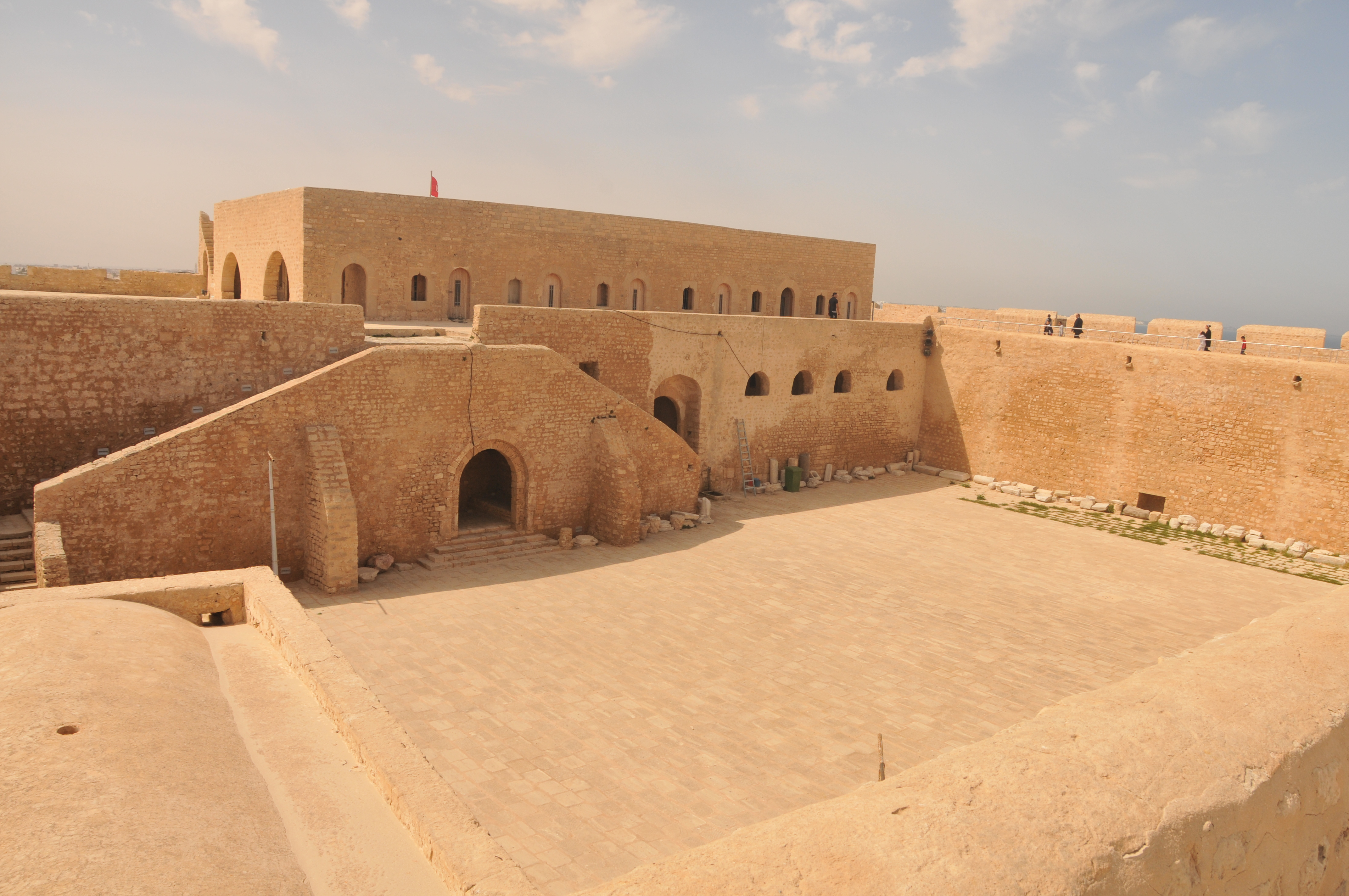 Cour intérieure du Borj El Kébir de Mahdia, Tunisie